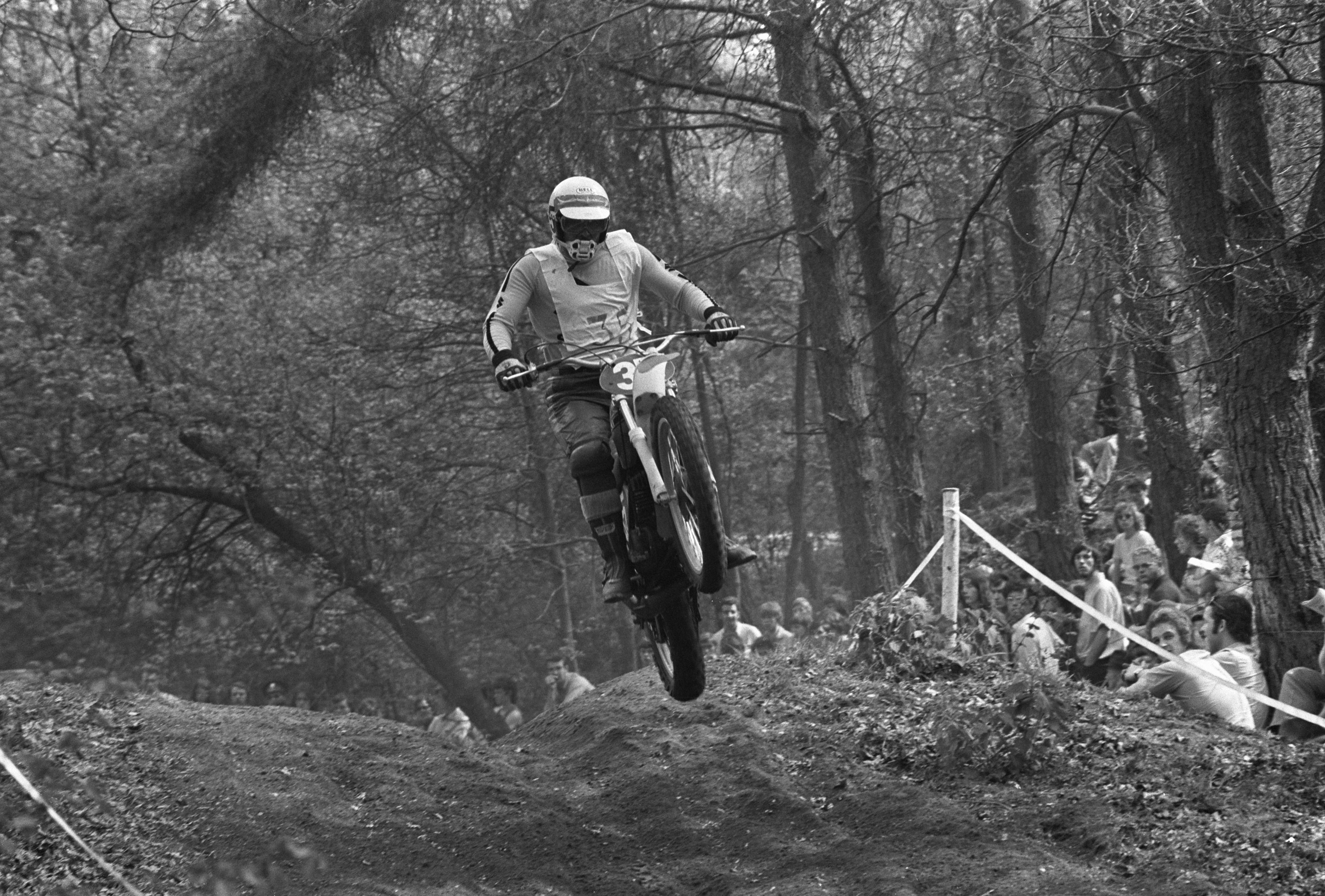 Collectie / Archief : Fotocollectie Anefo Reportage / Serie : Grand Prix 250 cc motorcross Beschrijving : Joel Robert in actie Datum : 7 mei 1972 Trefwoorden : motorcross, motoren Persoonsnaam : Robert, Joel Fotograaf : Rob Mieremet / Anefo Auteursrechthebbende : Nationaal Archief Materiaalsoort : Negatief (zwart/wit) Nummer archiefinventaris : bekijk toegang 2.24.01.05 Bestanddeelnummer : 925-5857